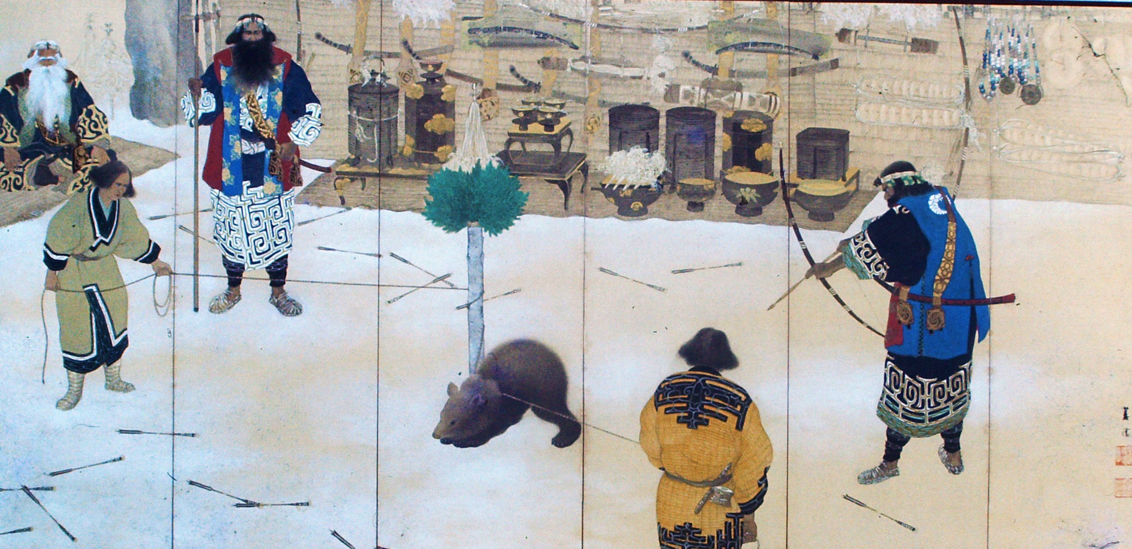 日本画家・村瀬義徳による「アイヌ熊祭屏風」（右）市立函館博物館蔵。肉筆画。大正七年